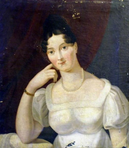 Анна Петровна Бутурлина, ур. Шаховская (1793—1861/69)